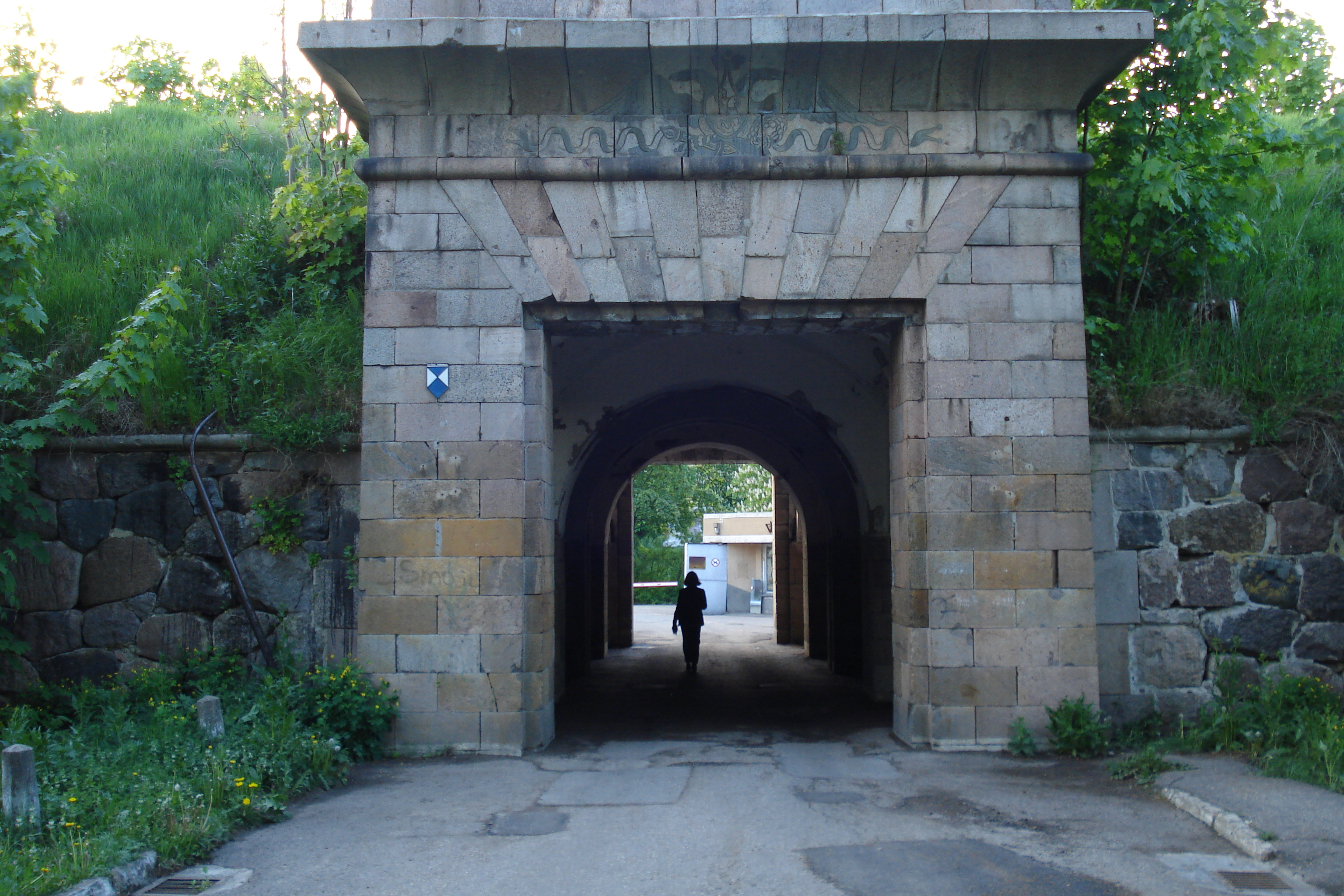 Michael's gates in the Daugavpils fortress. Outside. Михайловские ворота Динабургской крепости. Mihaila varti.Вид извне внутрь крепости, по бокам ворот главный вал крепости,с каменной облицовкой, в 20-х годах 20 века для удобства провели дамбу к воротам вместо деревянных мостов, на фронтоне по камню выбит двуглавый орёл